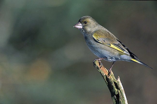 Carduelis chloris